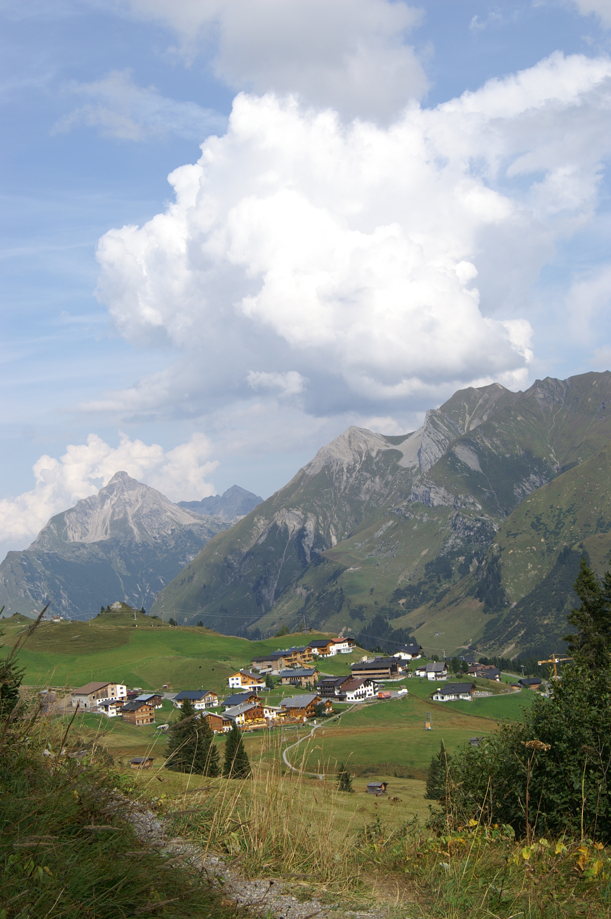 Naturschutzgebiet, Gipslöcher am Oberlech im Lechquellengebirge in Vorarlberg, eingerichtet 1988, 21 ha / im Hintergrund links das Warther Horn 2256m